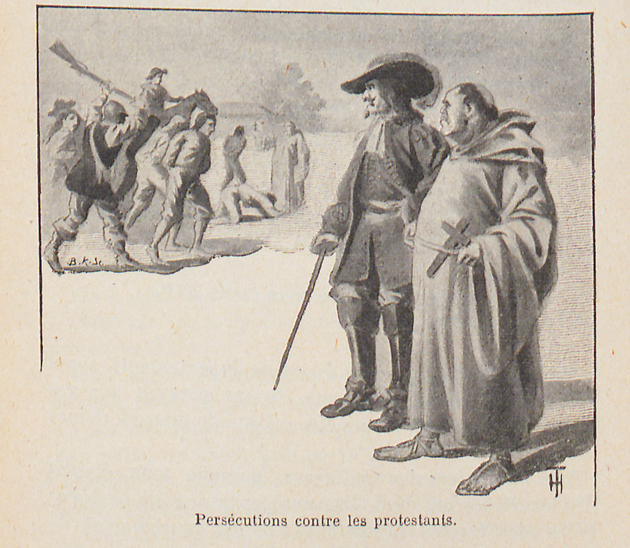 Illustration des Leçons de morale d'Albert Bayet, représentant les dragonnades